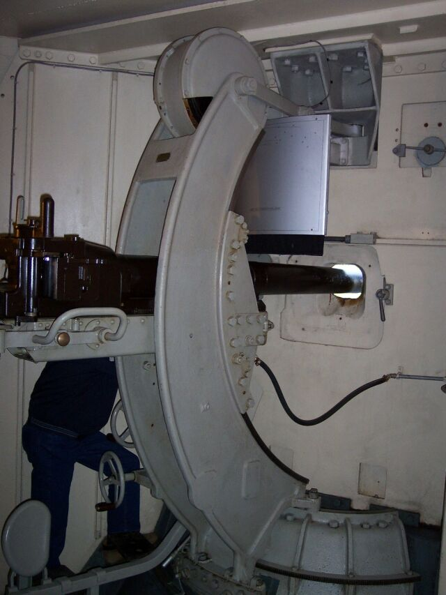 Heldsberg : 7,5 cm Befestigungskanone 38 L30